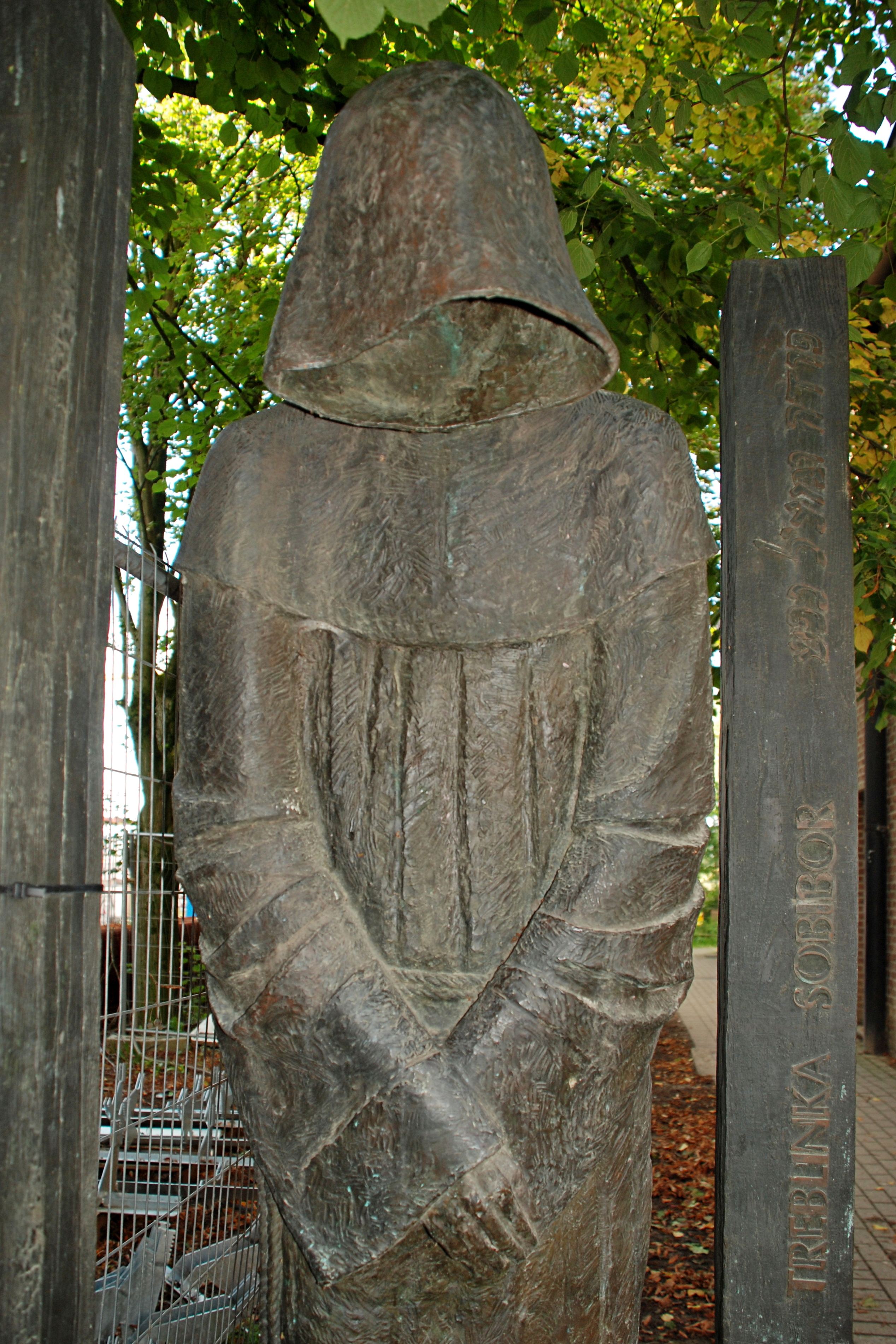 Belgique - Louvain-la-Neuve - Hommage au père Kolbe (Jean-Paul Emonds-Alt 2006)